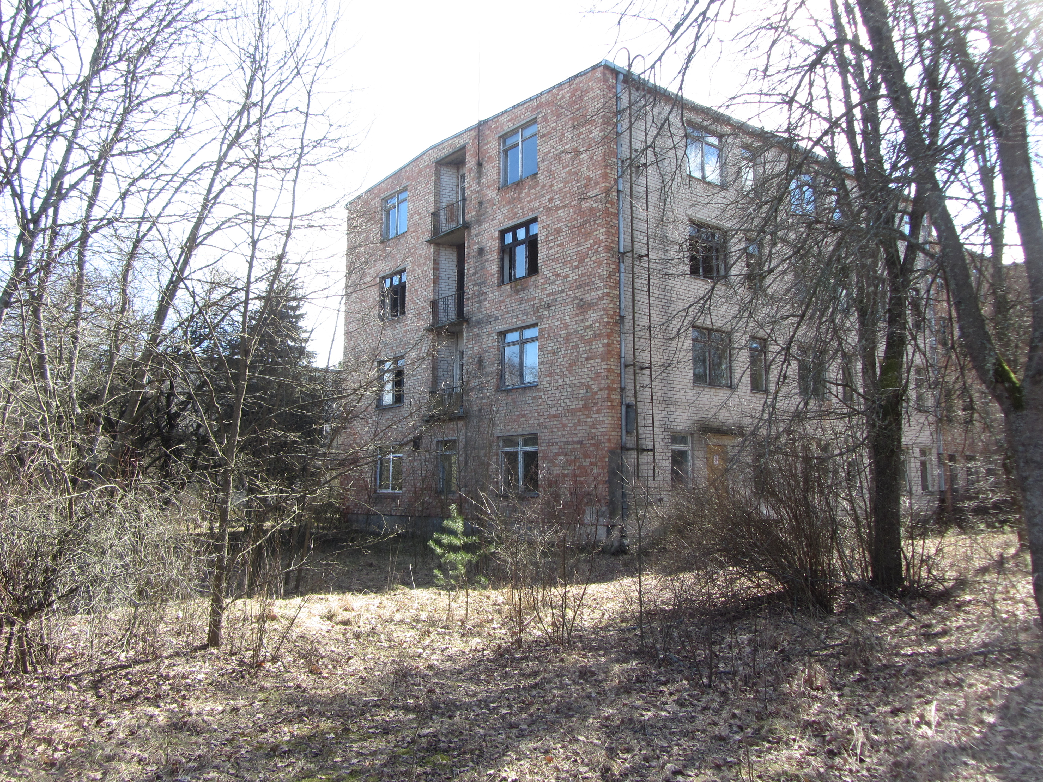 Valkininkų sen., Lithuania